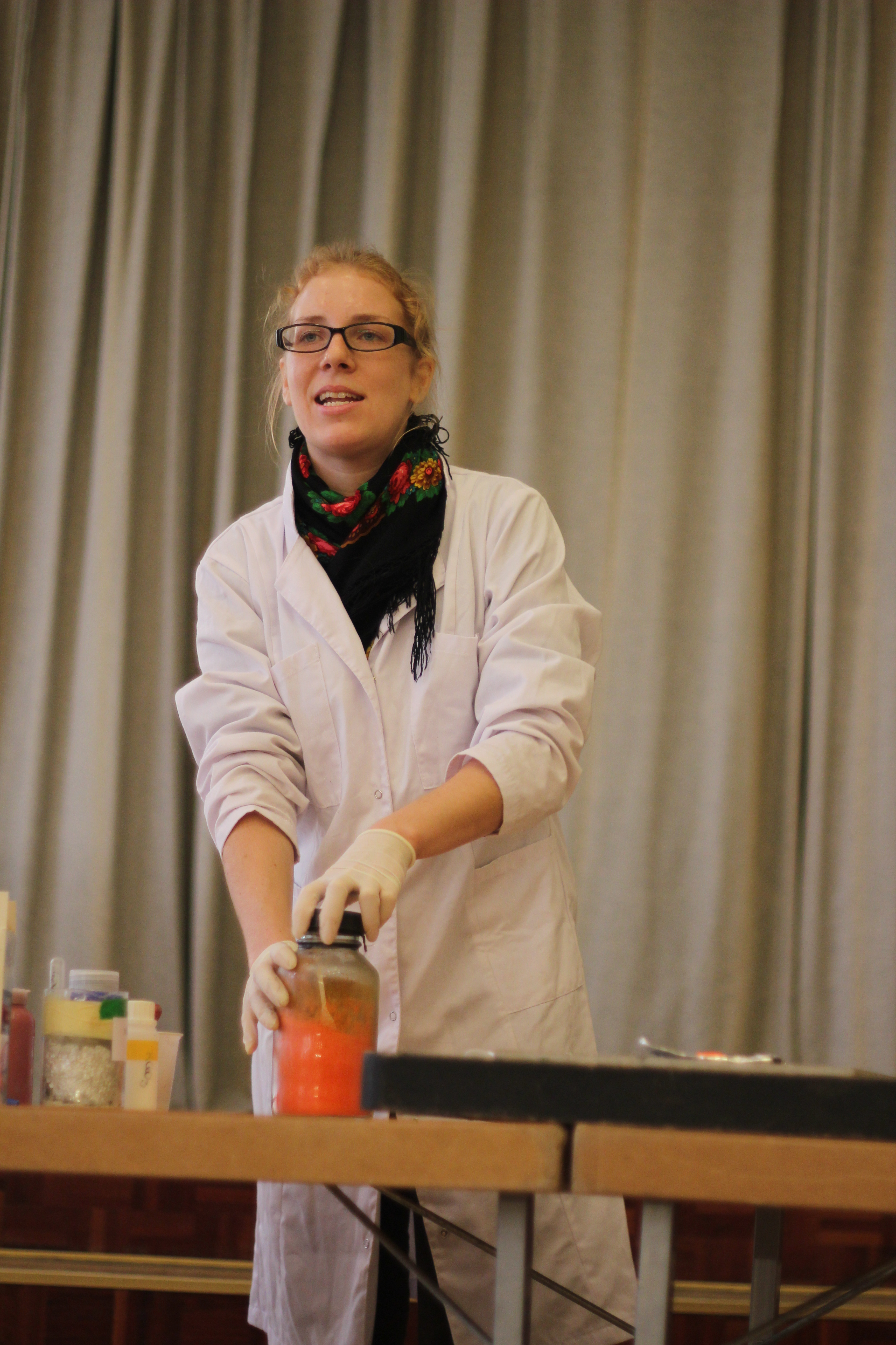 Teadushuviline Maris Palo Teadusbussist ette valmistamas nö. vulkaani katset ammooniumdikromaadiga.